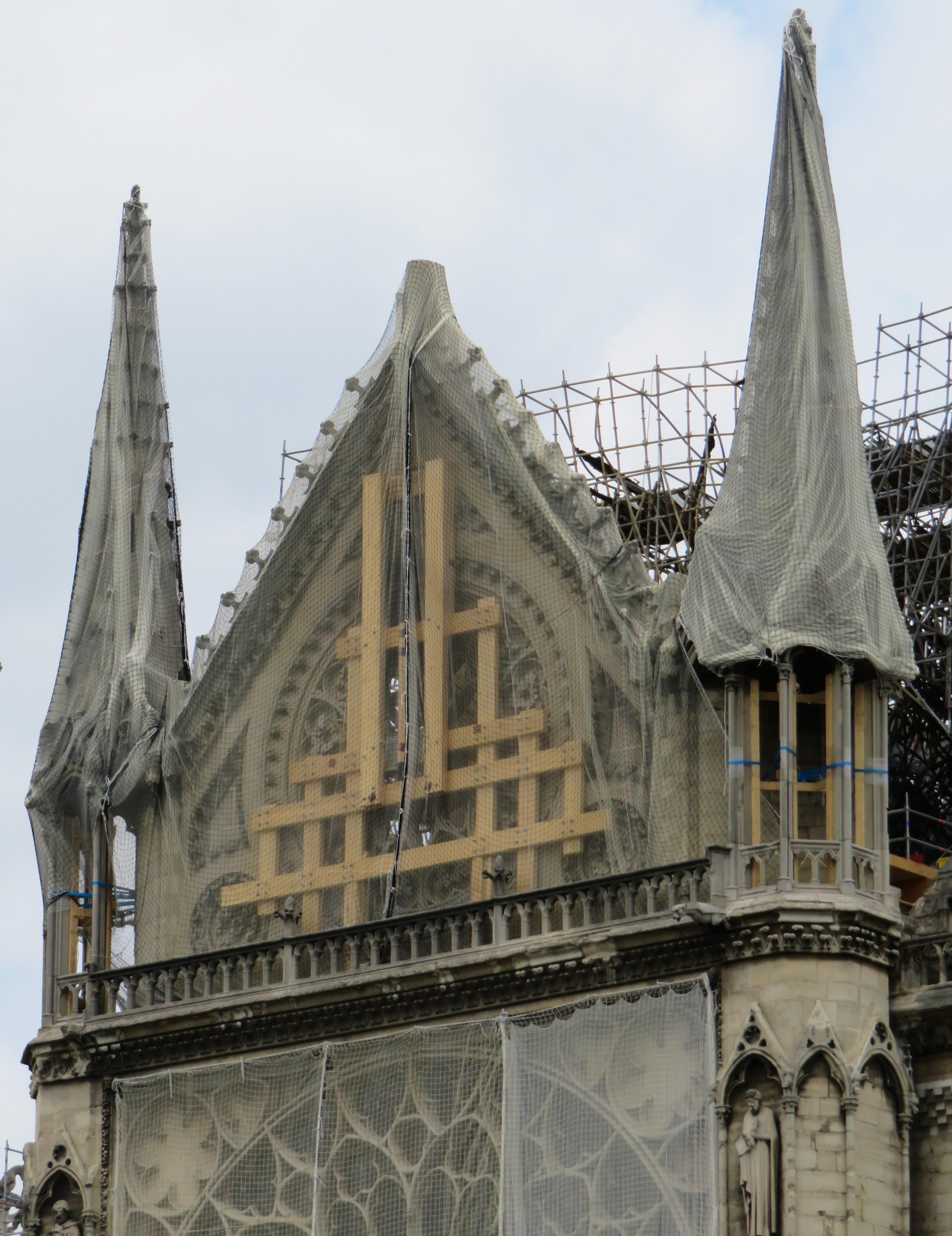 Photos du vendredi 31 mai (début d’après-midi), pour suivre les travaux sur Notre-Dame après l’incendie (échafaudages, bâchages).